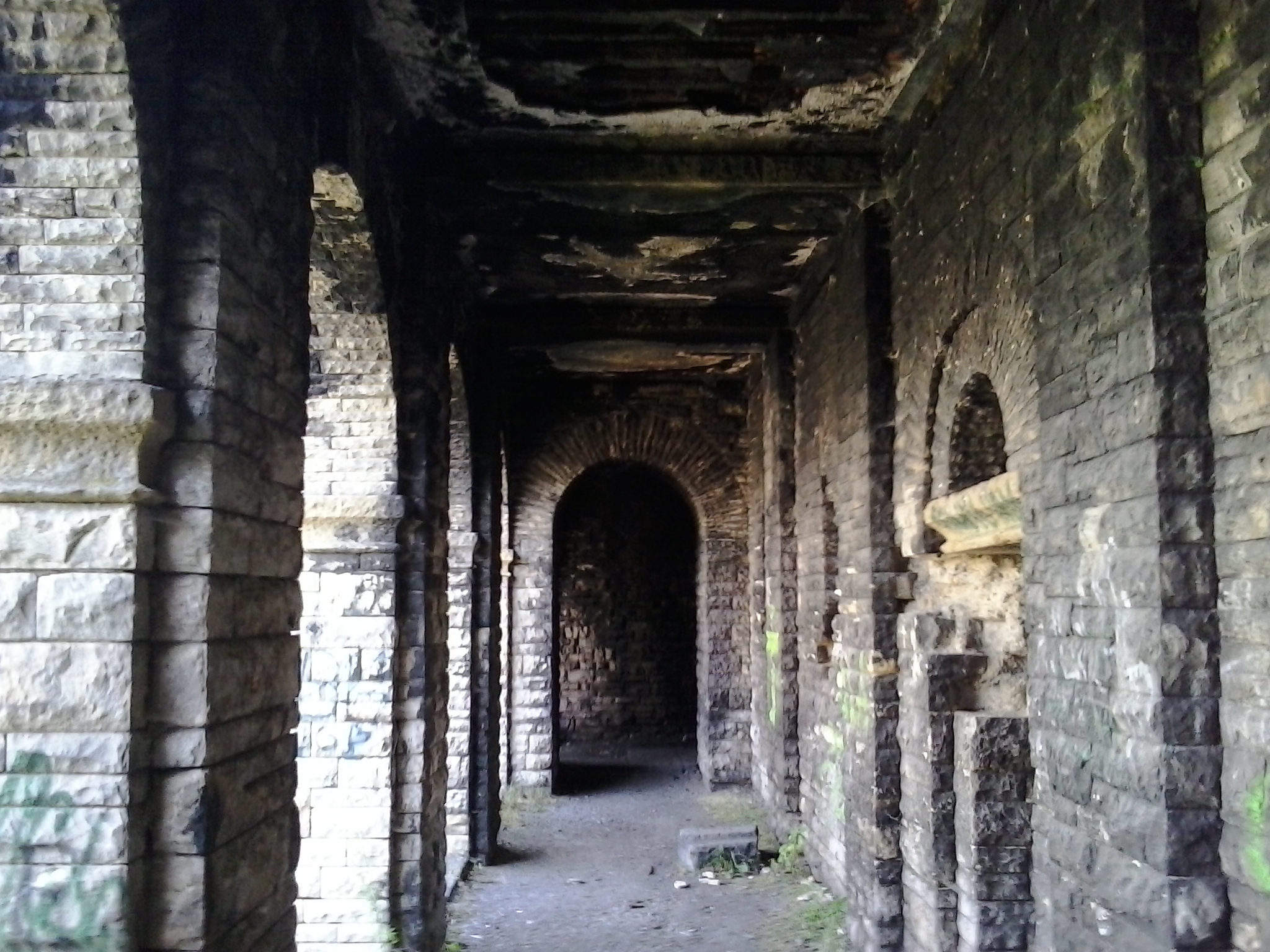 Nowe Miasto, Wałbrzych, Poland